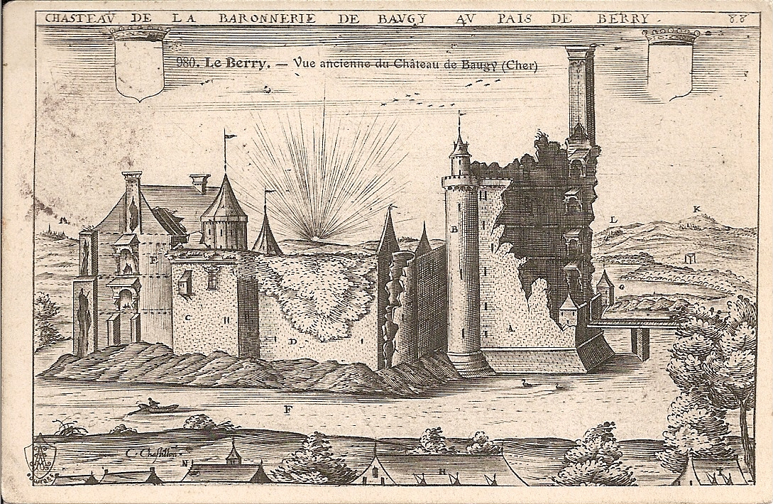 Vue ancienne du château de Baugy (ancienne gravure reproduite sur une carte postale de 1906).